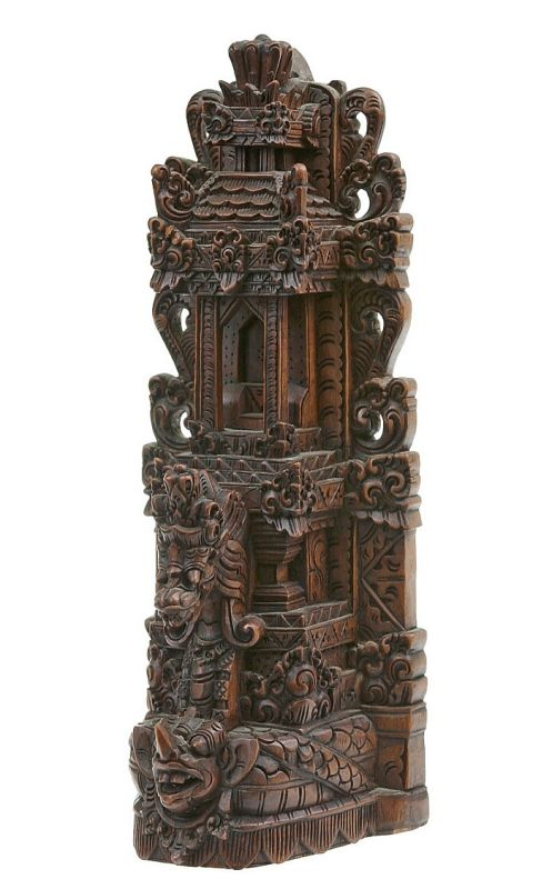 Beeld. Houten beeld voorstellende een schrijn met de slang Anantabhoga en de schildpad Bedawang Nala